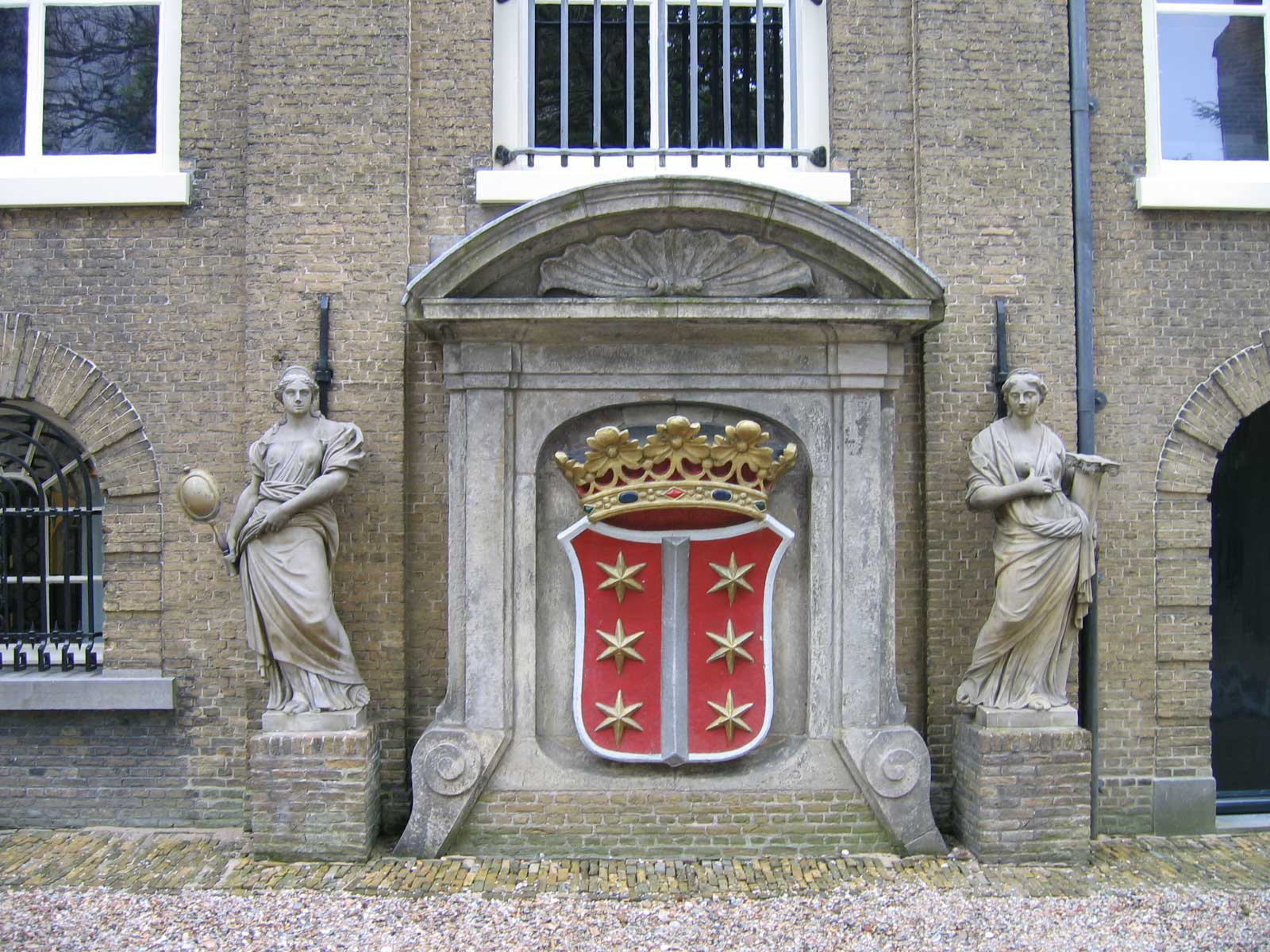 De beelden Wijsheid en Standvastigheid ter weerszijde van het wapen van Gouda (museumtuin Gouda)